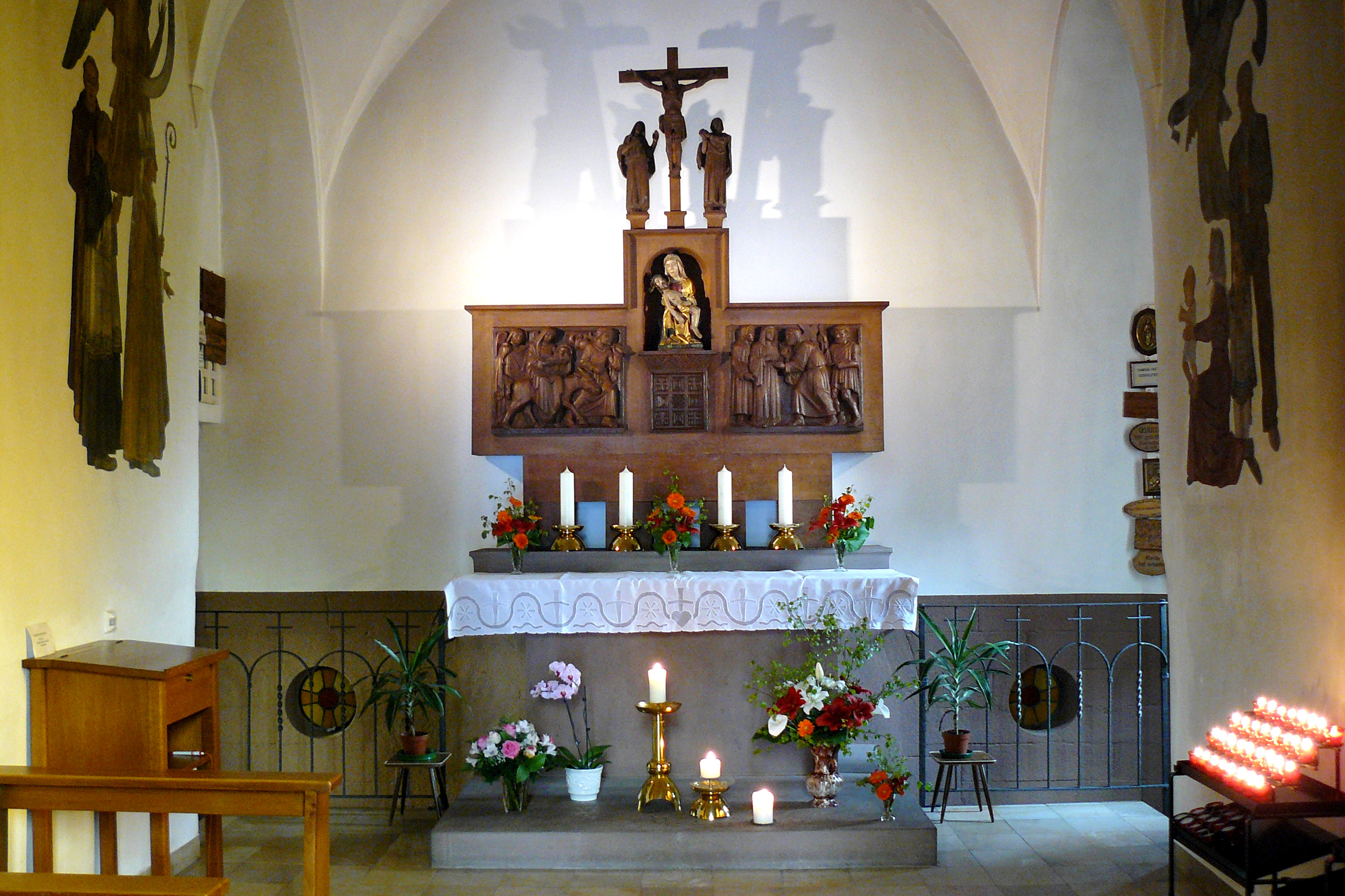 Kloster Heiligenbronn - Gnadenkapelle mit Gnadenbild